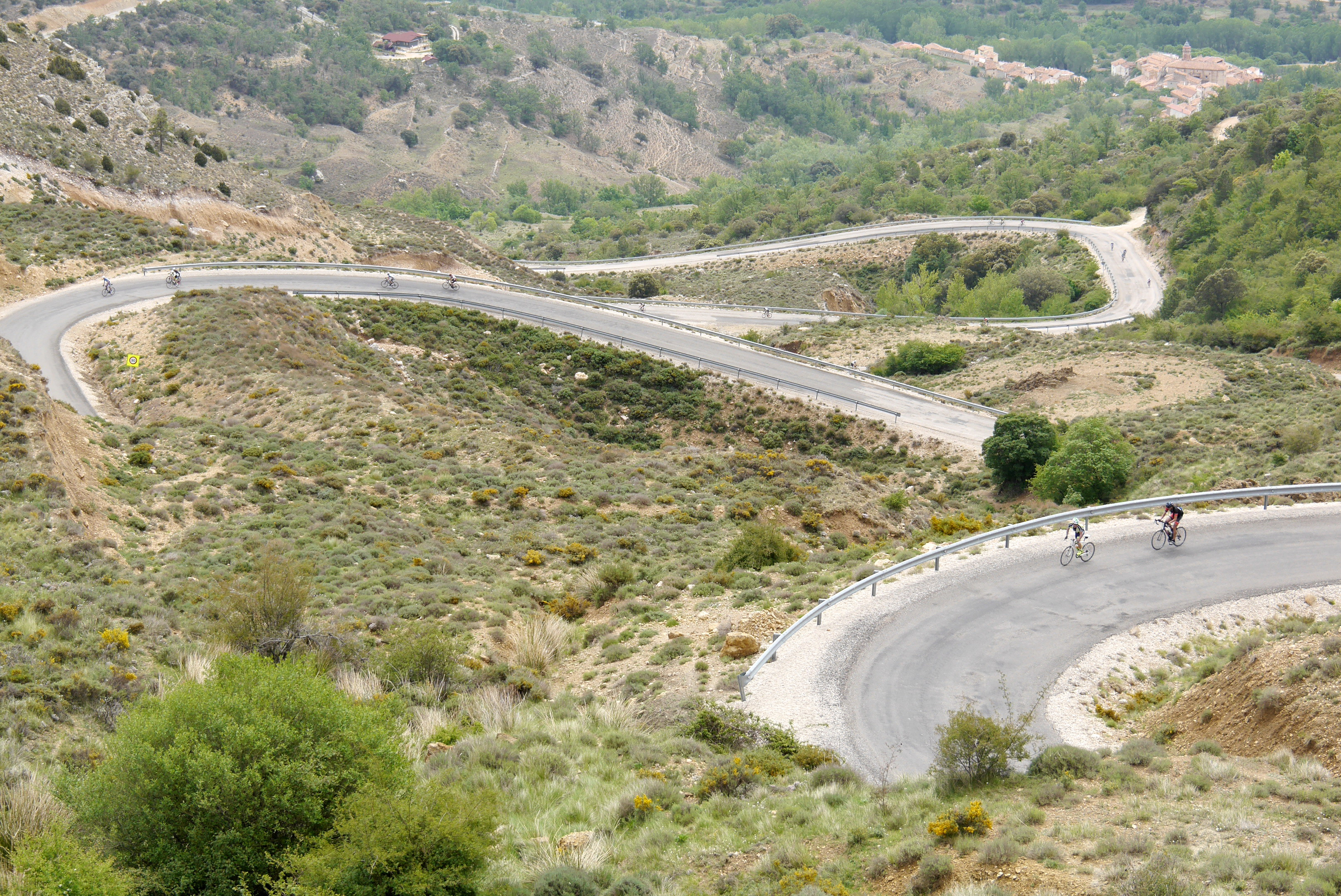 IX Marcha Cicloturista Geoparque del Maestrazgo